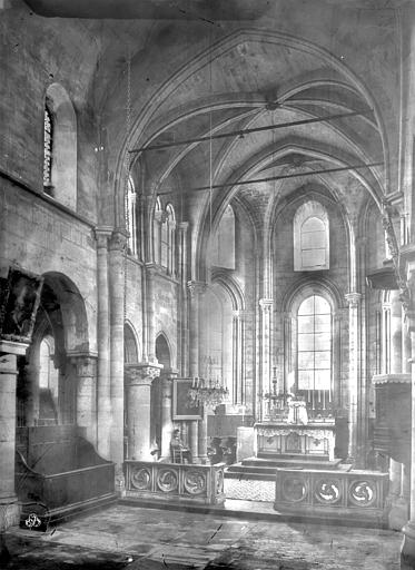 Nef